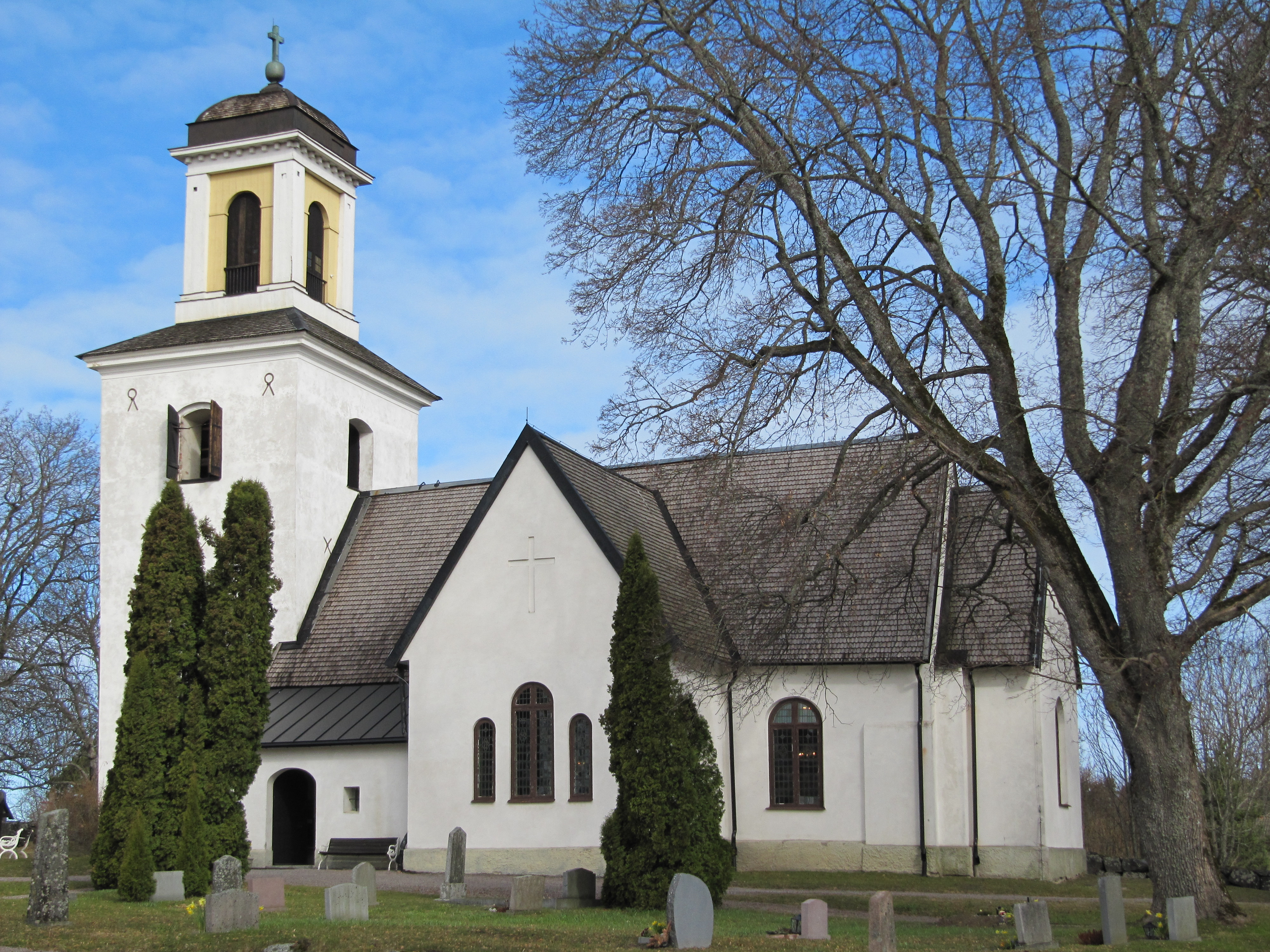 Alsike kyrka